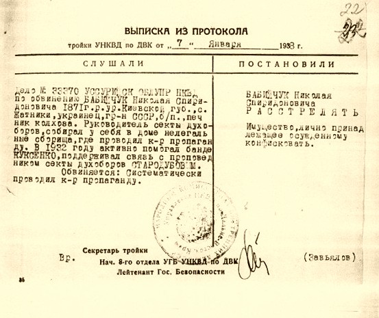 Типовая выписка из протокола заседания Тройки НКВД с приговором (выписка предназначалась для вложения в личное дело осужденного)